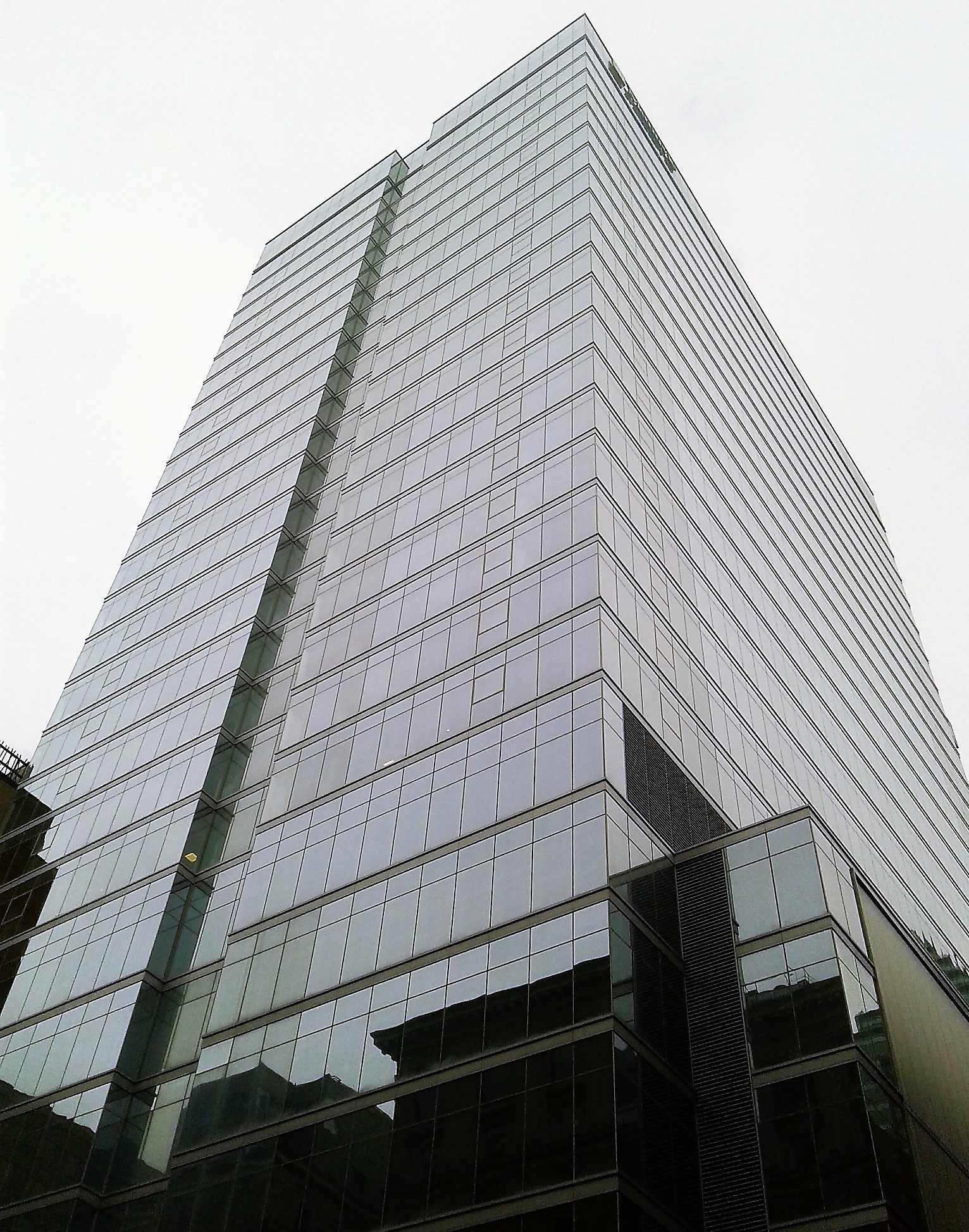 Maison Manuvie (autres noms: Tour millenium, 900 De Maisonneuve Ouest, Place du Millennium), 900, boulevard de Maisonneuve Ouest, Montréal Vue de la rue Metcalfe